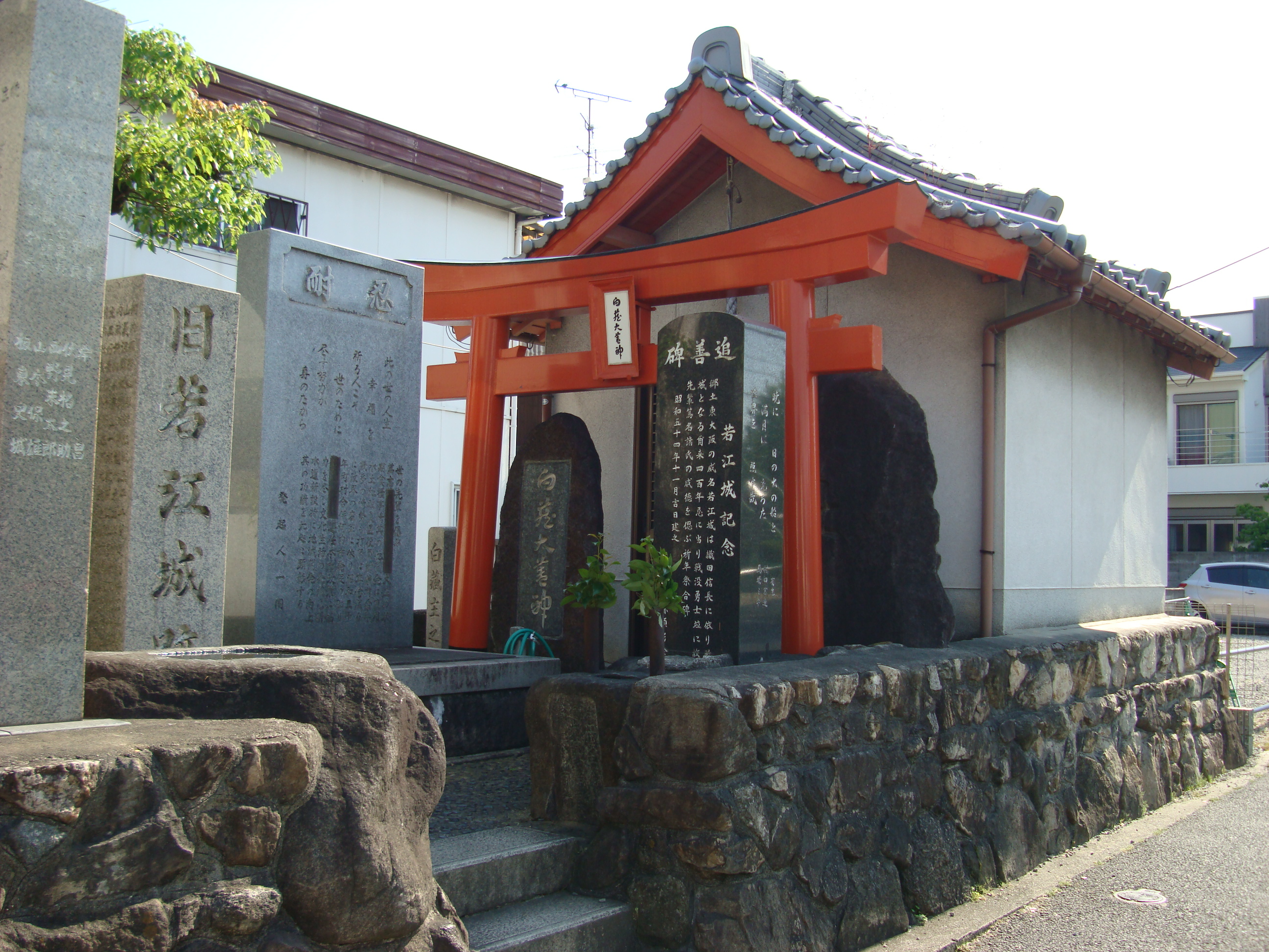 若江城跡（東大阪市）